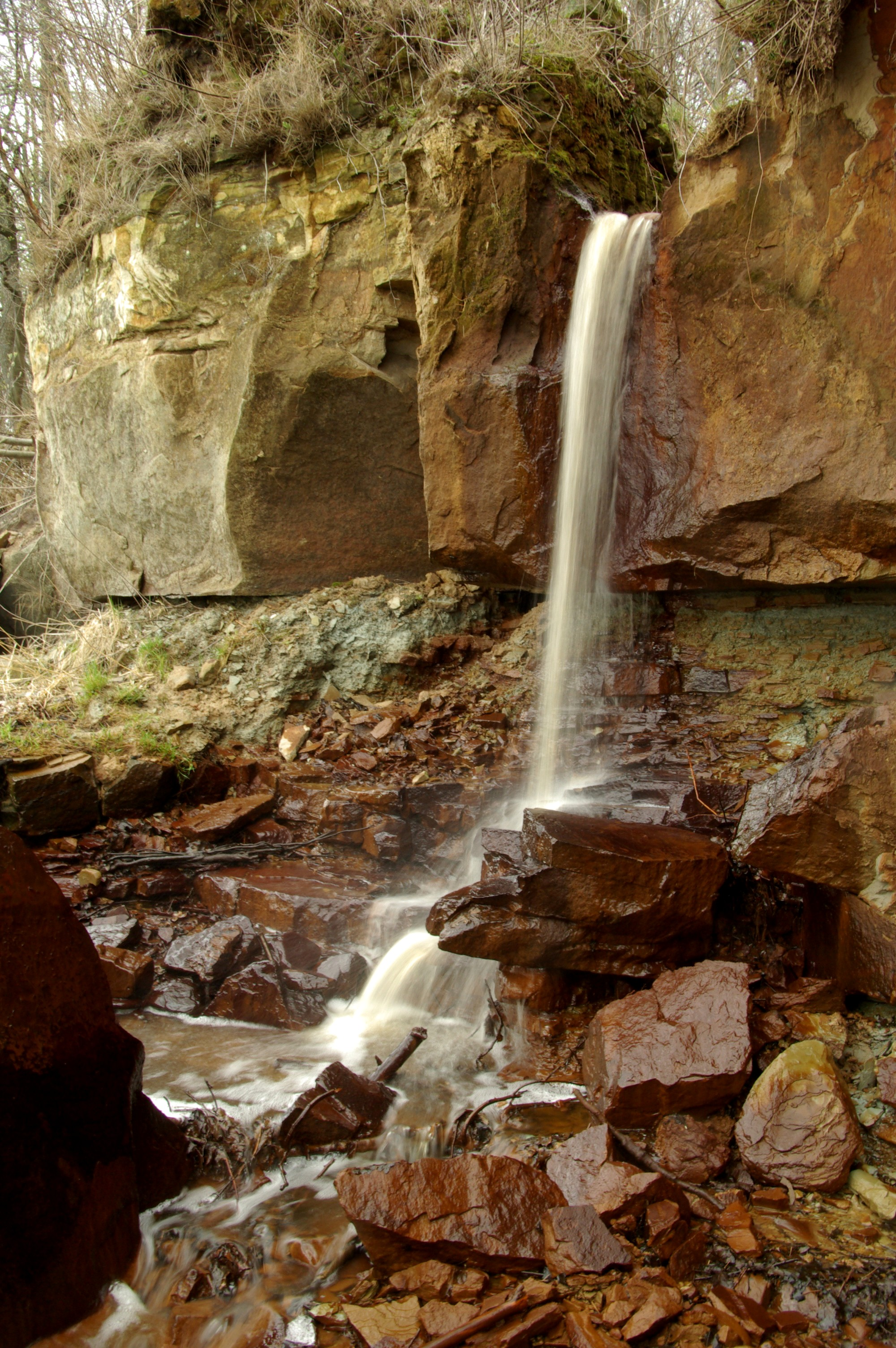 asub Tallinnas Vabaõhu muuseumi territooriumil